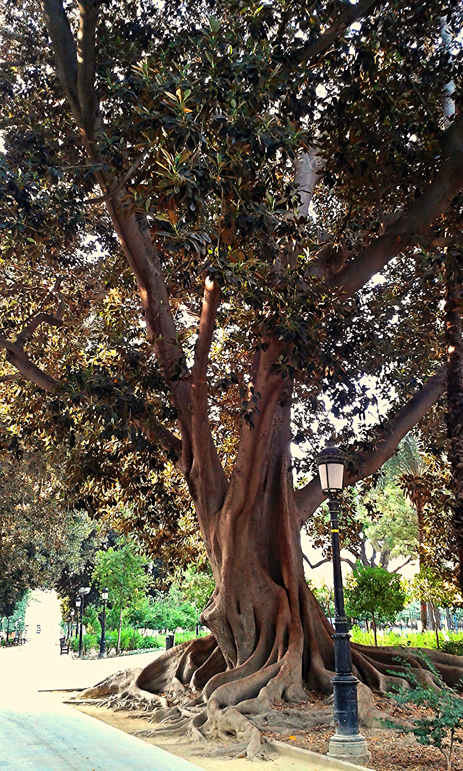 Ficus anciano